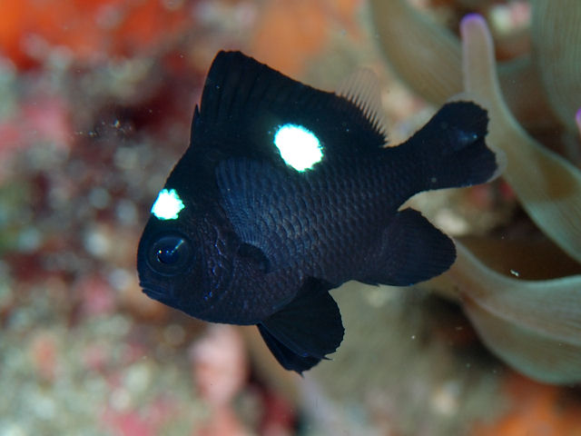 ミツボシクロスズメダイ Dascyllus trimaculatus